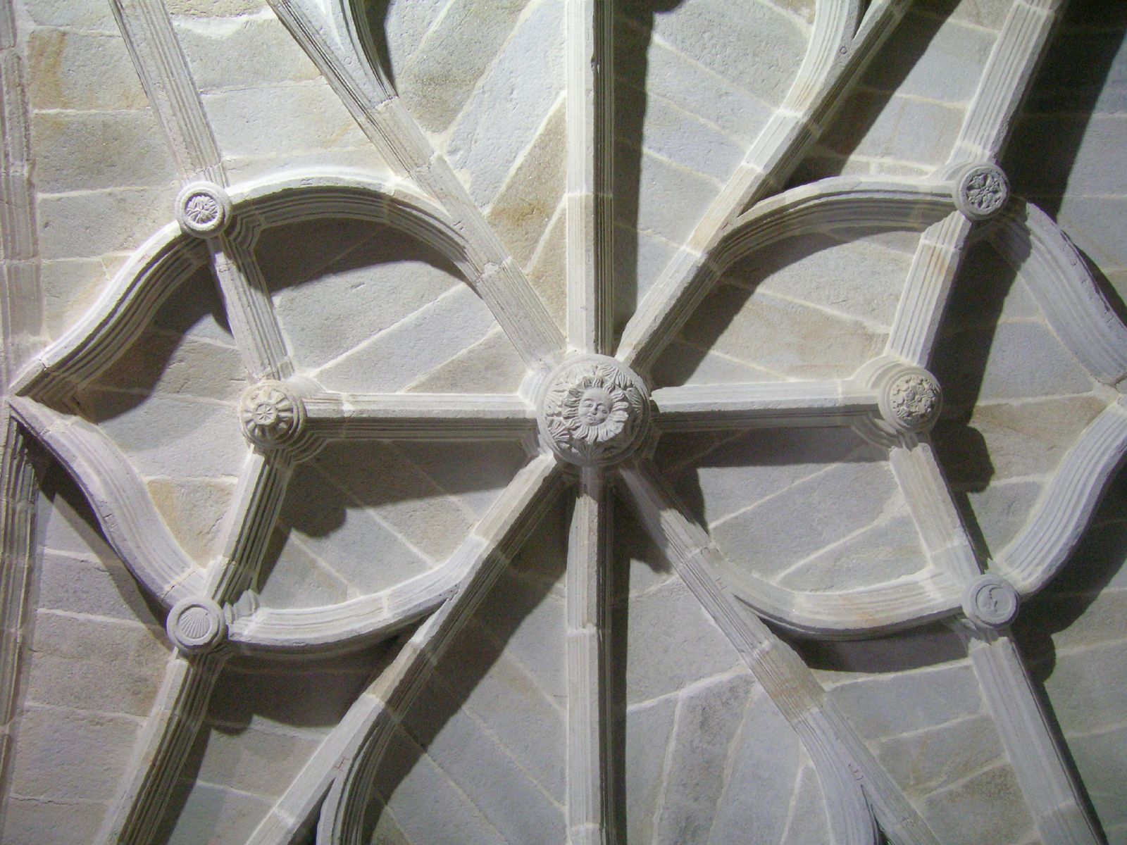 Detalle de Bóveda de crucería Mosteiro de Santa María de Oia